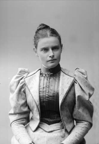 Depicted person: Anna Backer